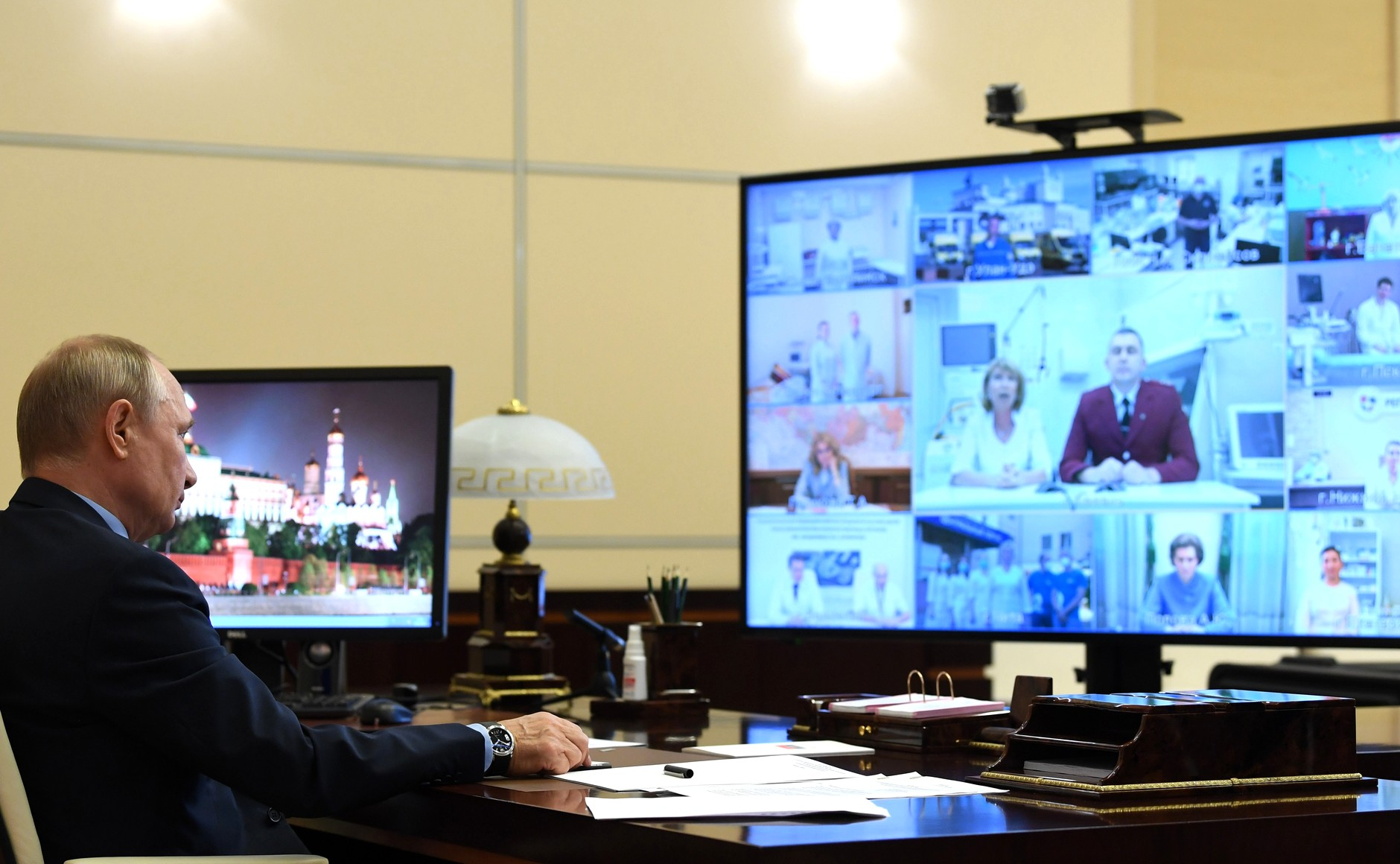 В преддверии Дня медика, отмечаемого в России ежегодно в третье воскресенье июня, Владимир Путин в режиме видеоконференции провёл встречу с медицинскими работниками. 20 июня 2020 года.